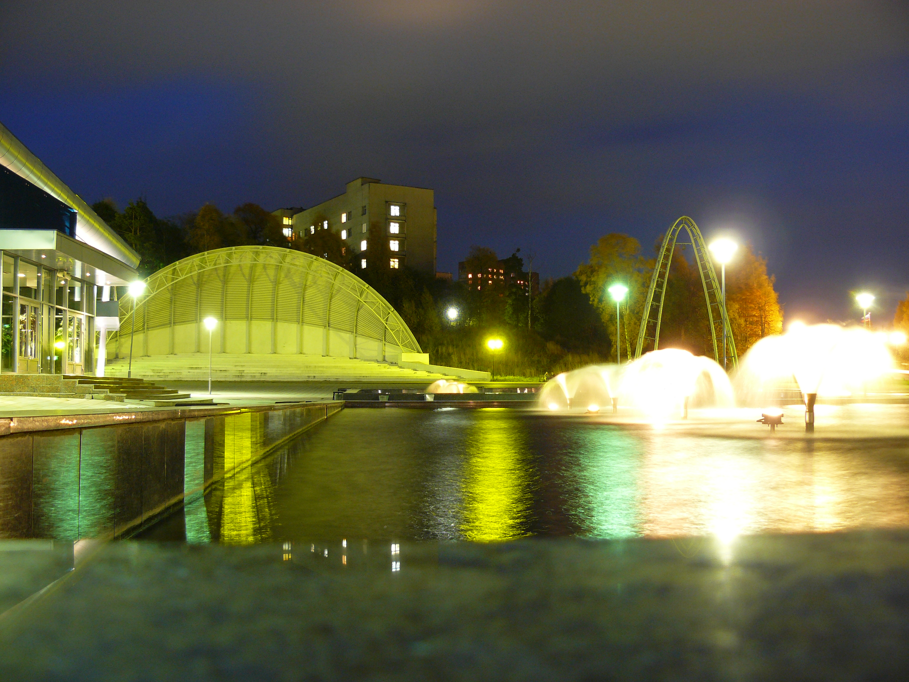 Кондопога. Ледовый дворец, открытая сцена, районная больница (на пригорке)